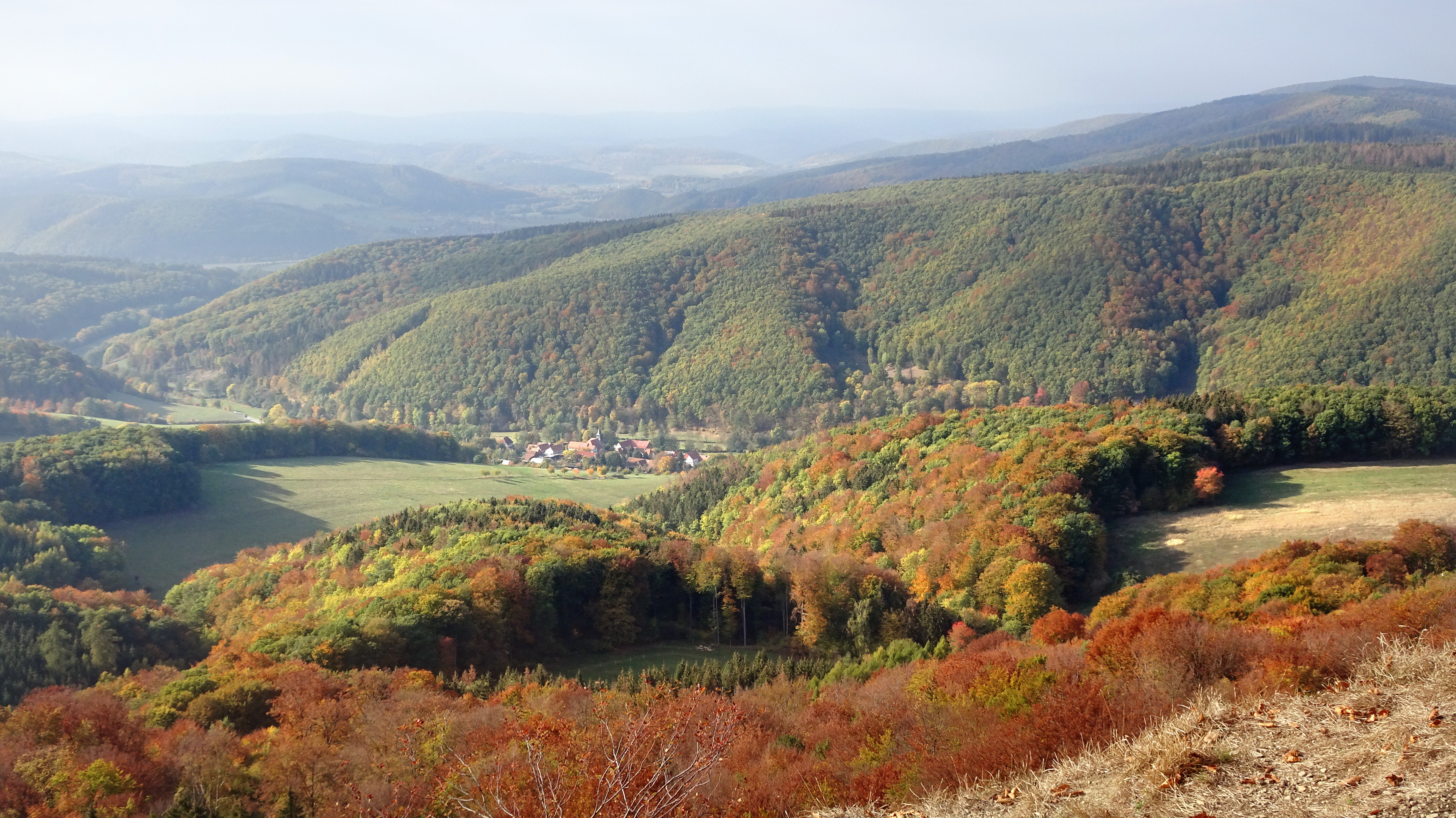 Der kleine Ort liegt im Walsetal, unterhalb der Hänge des Höhberges und des Mühlberges. Die Berge sind die südlichen Ausläufer des Höhebergs, eines Höhenzugs des Unteren Werraberglandes, im Grenzbereich von Hessen und Thüringen. Die ausgedehnten Waldgebiete auf Buntsandstein gehören zum Flora-Fauna-Habitat-Gebiet 4626-306 „Röhrsberg-Hasenwinkel-Mühlberg“ und zum EU-Vogelschutzgebiet 4626-420 „Werrabergland südwestlich Uder“. Die „Dietzenröder Klippen“ sind die westliche Abbruchkante des Bergplateaus „Auf dem Stein“ im FFH-Gebiet 4726-320 „Stein-Rachelsberg-Gobert“. Dieser Bereich im Nordwesten Thüringens liegt vollständig im Landschaftsschutzgebiet „Obereichsfeld“.